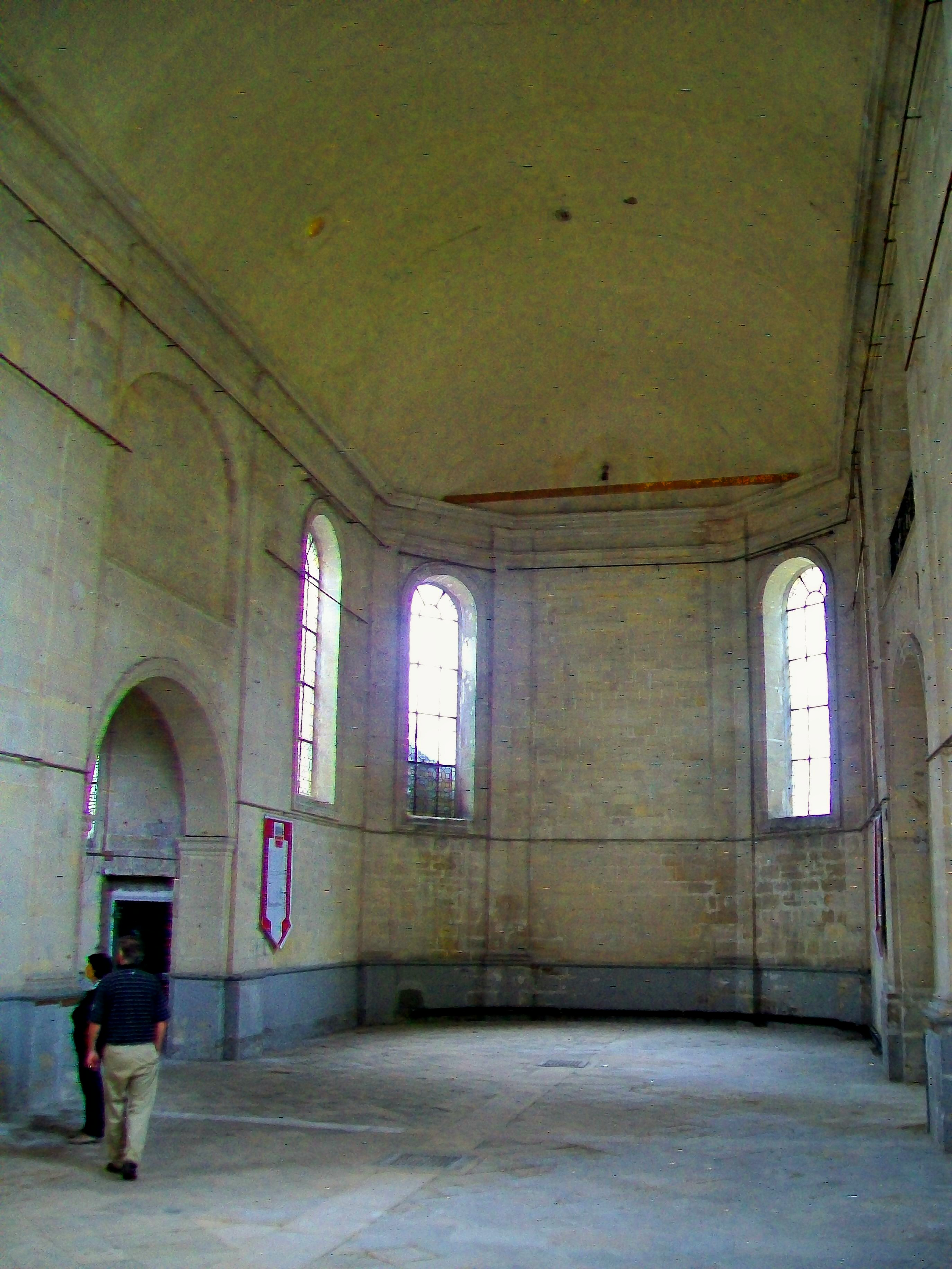 La nef de la chapelle, vue sur le choeur.